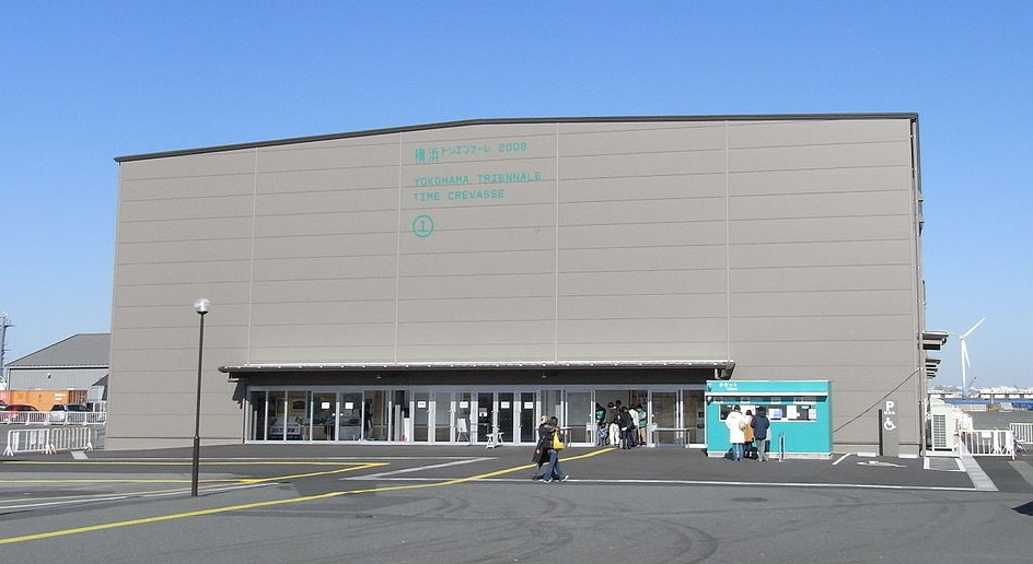 横浜市中区新港にある新港ピア（「横浜トリエンナーレ2008」開催時）